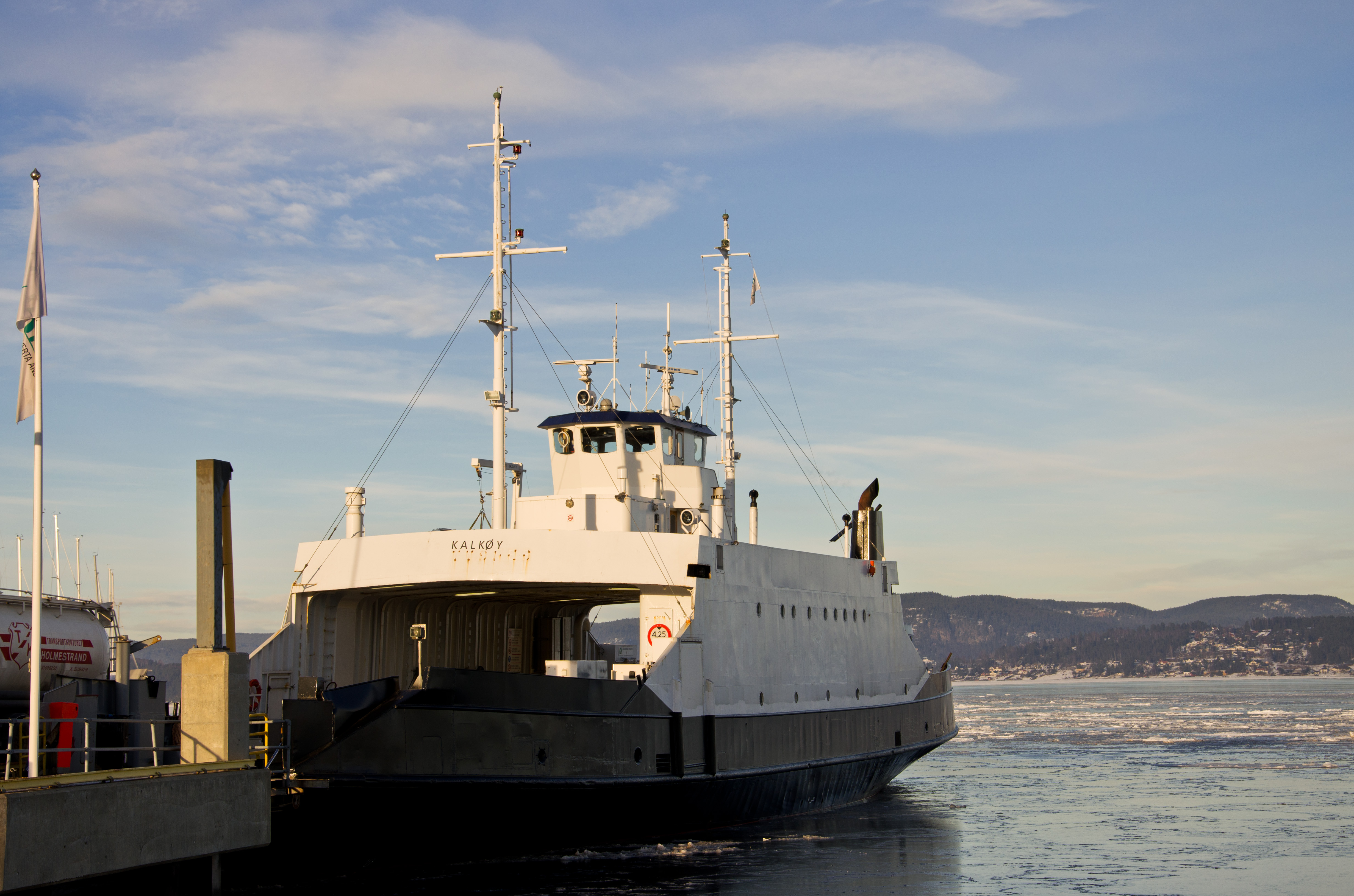 M/F «Kalkøy», tidligere M/F «Tysnes», ved fergekaia i Holmestrand.